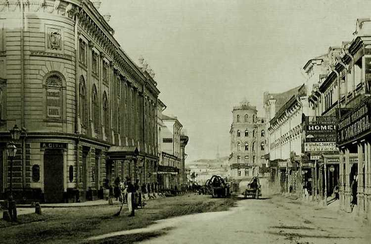 Ильинка. Вид на Троицкое подворье (с башенкой)